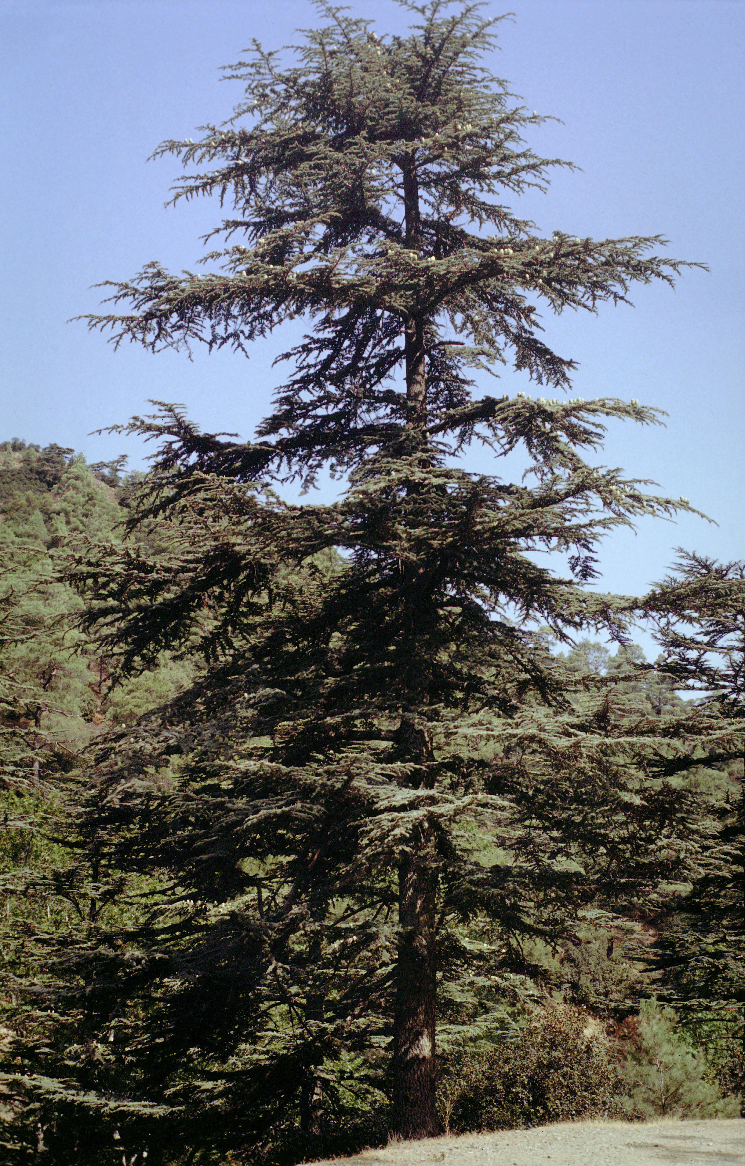 Im Zederntal im westlichen (Troodos, Zypern.